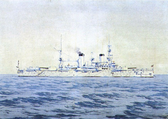 Броненосец «Севастополь», тип "Полтава", спущен в 1895, затоплен в 1904